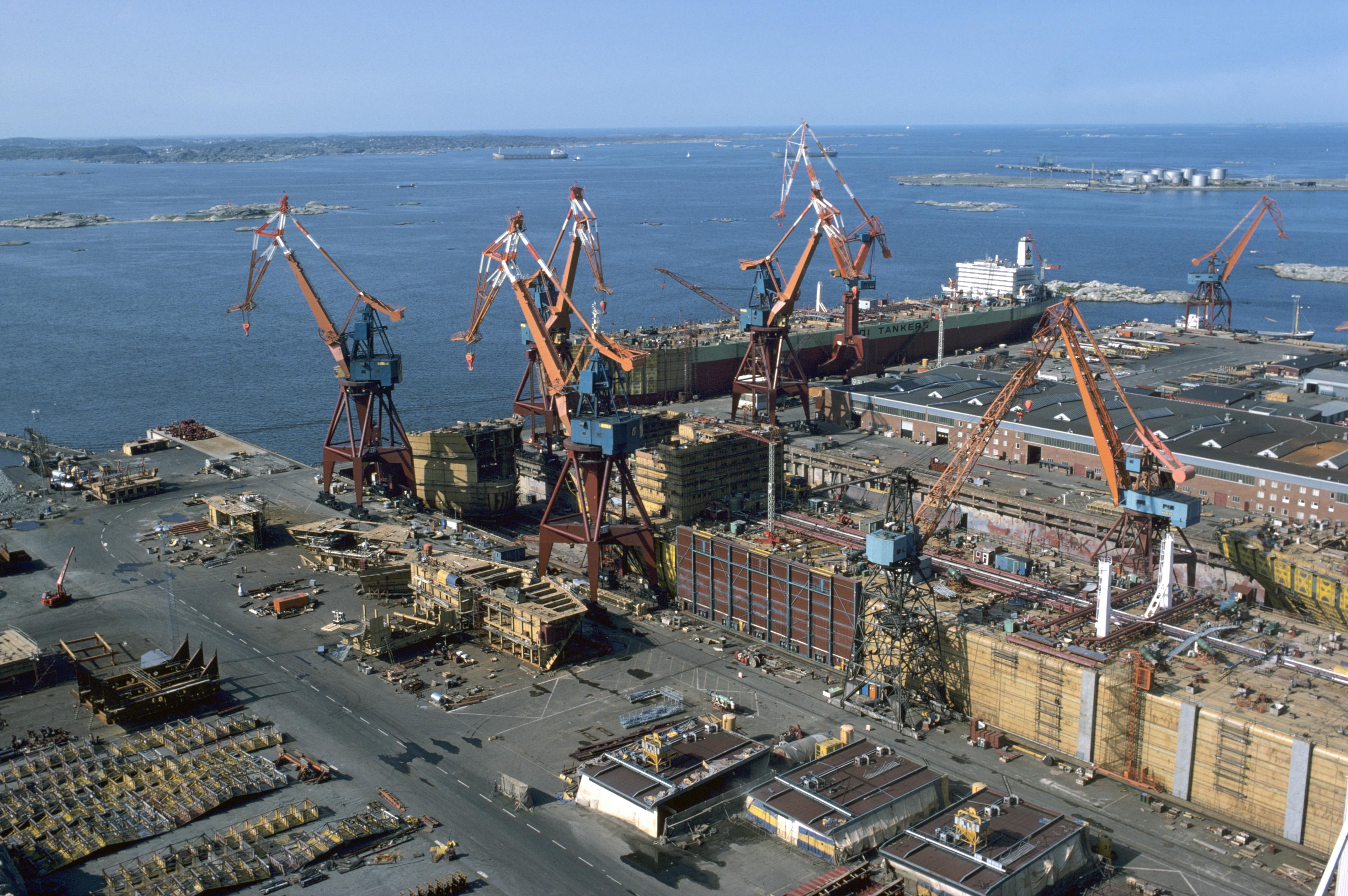 Flygbild över varvet. Motiv: Arendalsvarvet Nyckelord: Flygbilder, Riksintressen Kategori: Kust- och skärgårdsmiljö, Varv Flygbild över varvet.